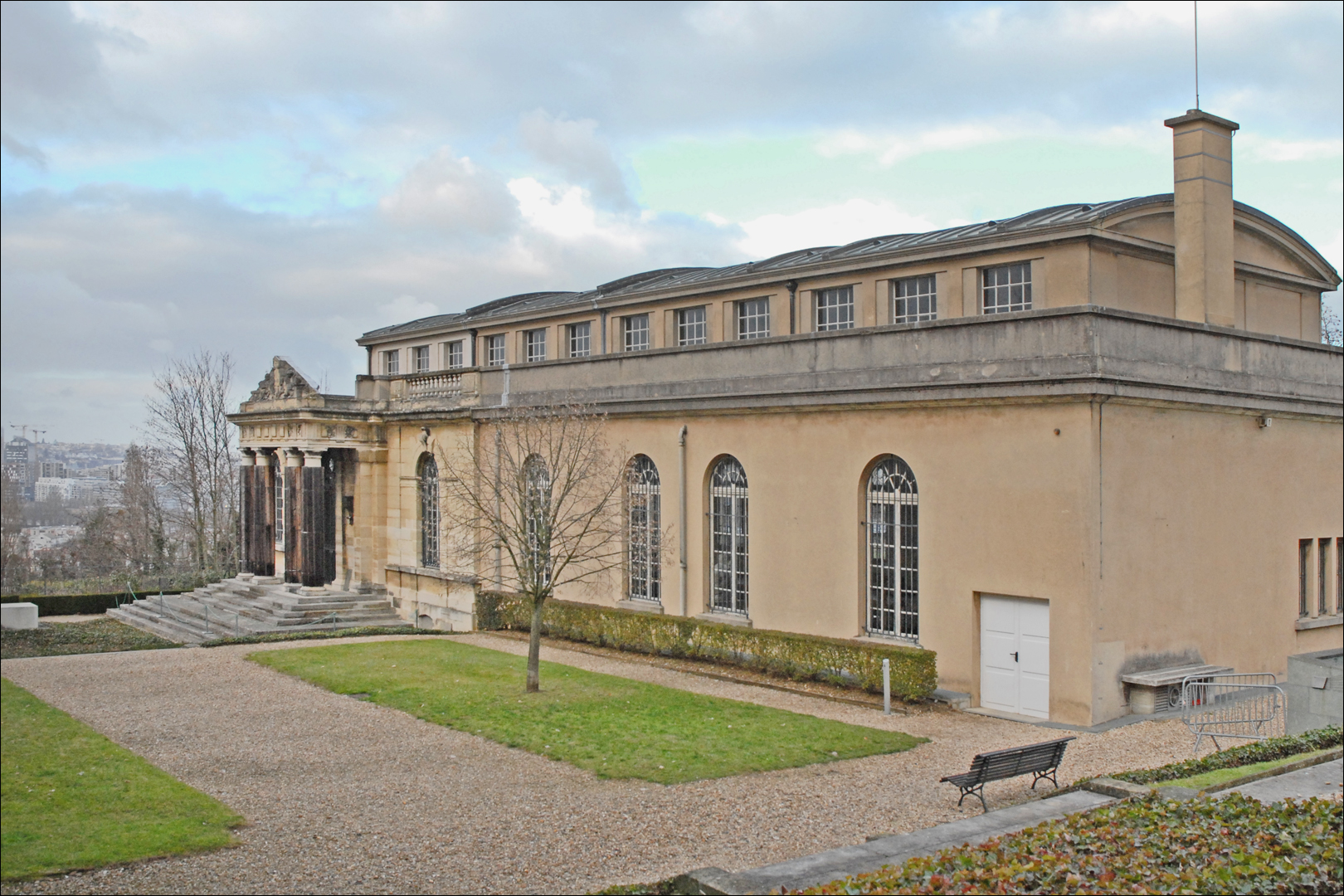 Dès 1893, Auguste Rodin s'installe dans la villa des Brillants (sur une colline à Meudon, une ville proche de Paris et dans un zone de carrière). Il y habite avec son amie Rose Beuret qu'il n'épousera que peu de temps avant leur mort à tous deux, la même année 1917, à quelques mois d'intervalle. En contrebas du terrain, il fait reconstruire le fronton et une partie de la façade du château d'Issy, sans rien autour. Depuis 1948, ces éléments d'architecture ont été adossés à un bâtiment servant de musée (photo). Le musée Rodin de Meudon n'est composé que d'une seule salle dans laquelle sont présentées de nombreuses épreuves de ses oeuvres réalisées en plâtre et sur lesquelles il poursuivait ses recherches plastiques.